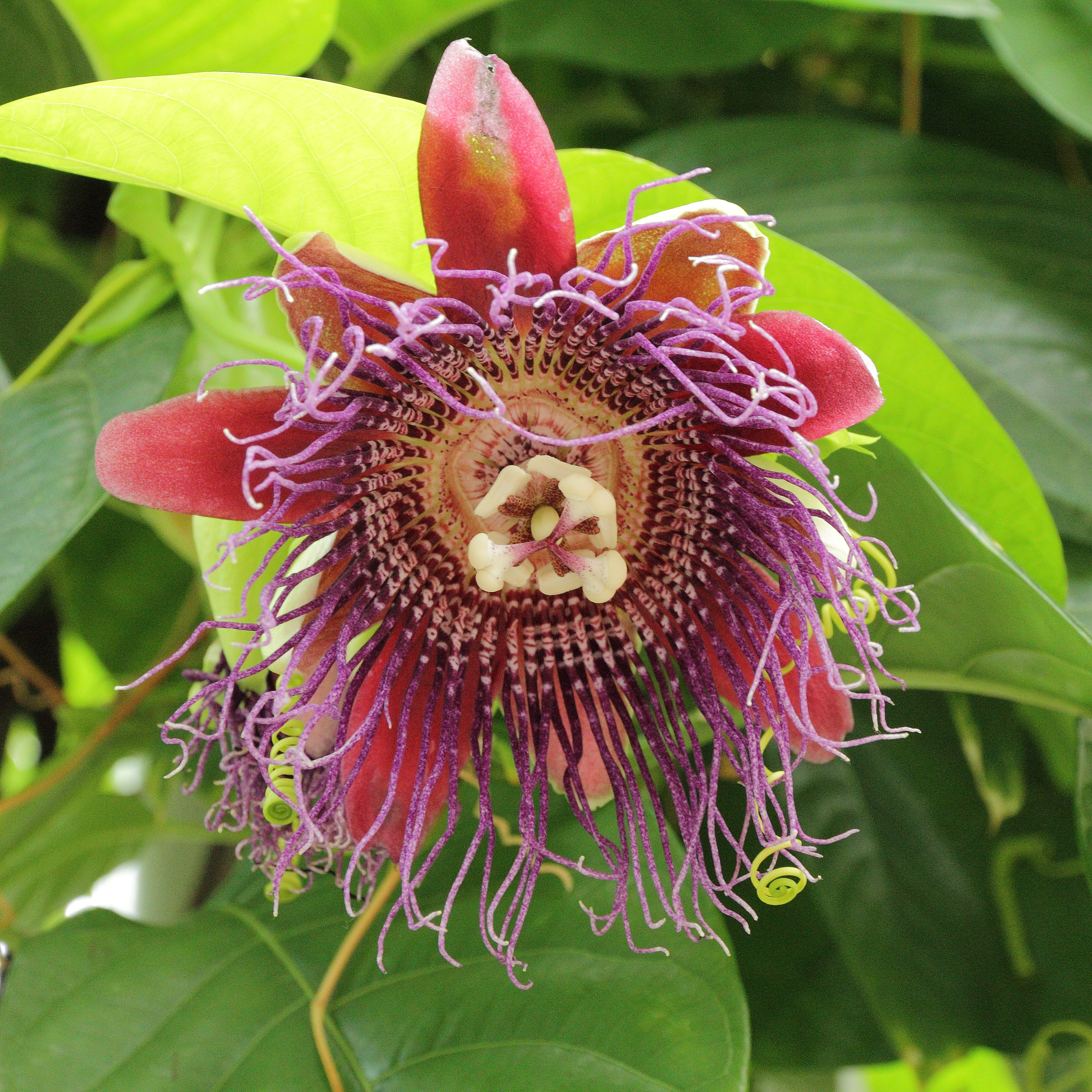 Passiflora quadrangularis i Bergianska trädgården.